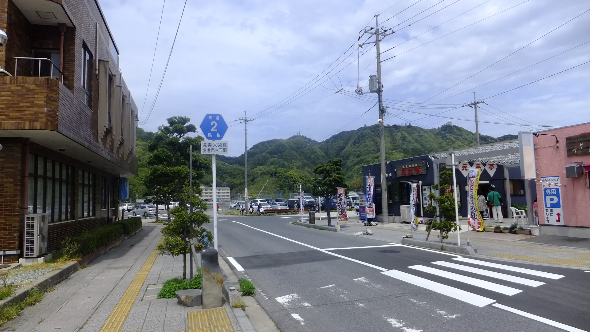 鳥取県境港市大正町 鳥取県道・島根県道2号境美保関線